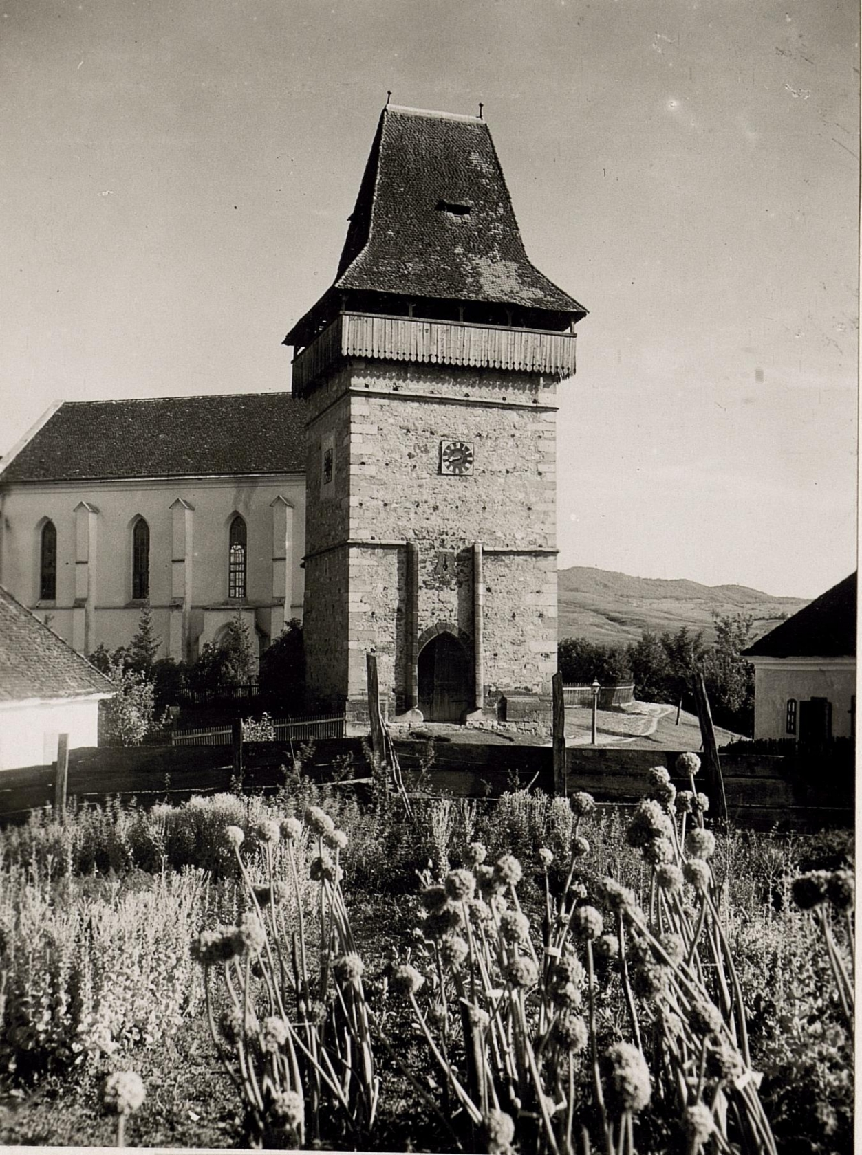 Nagydemeter Kirche